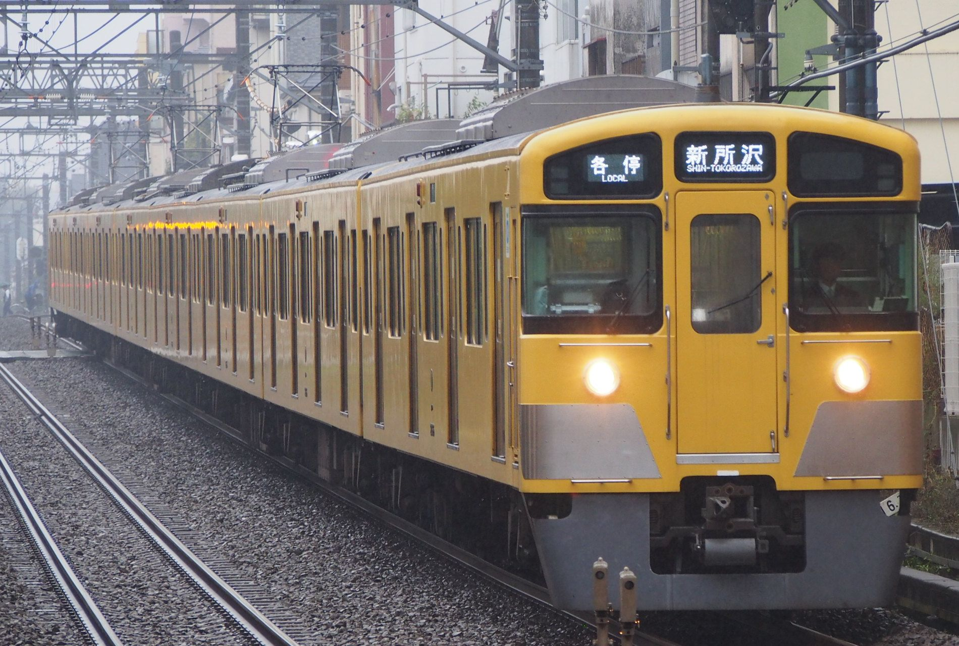 ほぼ終日にわたって運転される各停新所沢行き